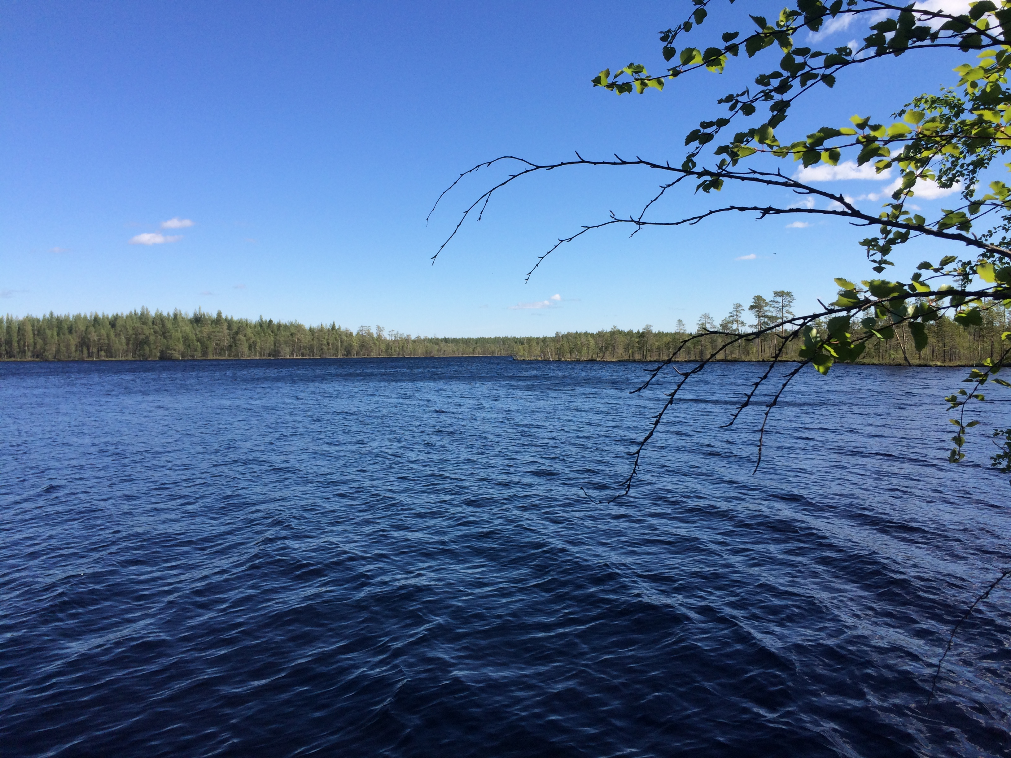 Белочье